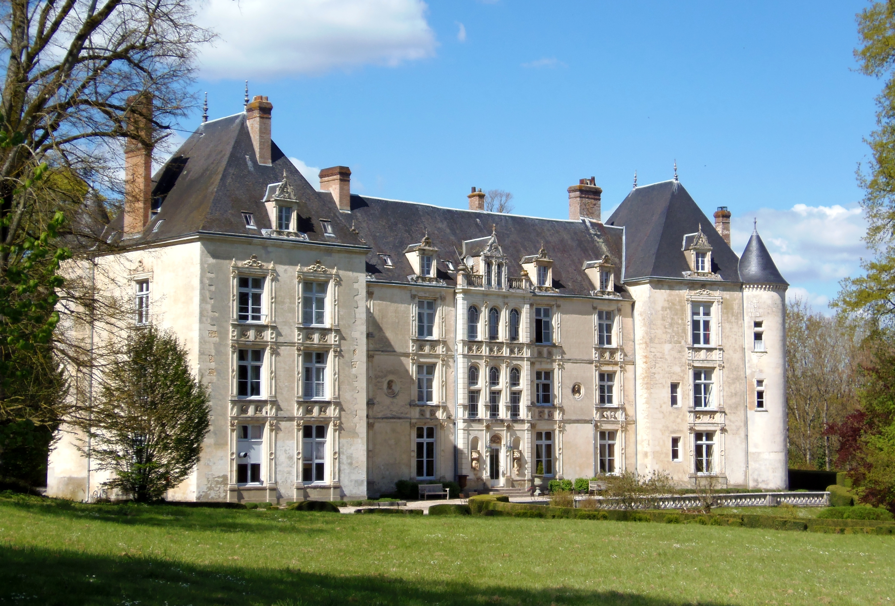 Condeau (Normandie, France). Le château de Villeray.